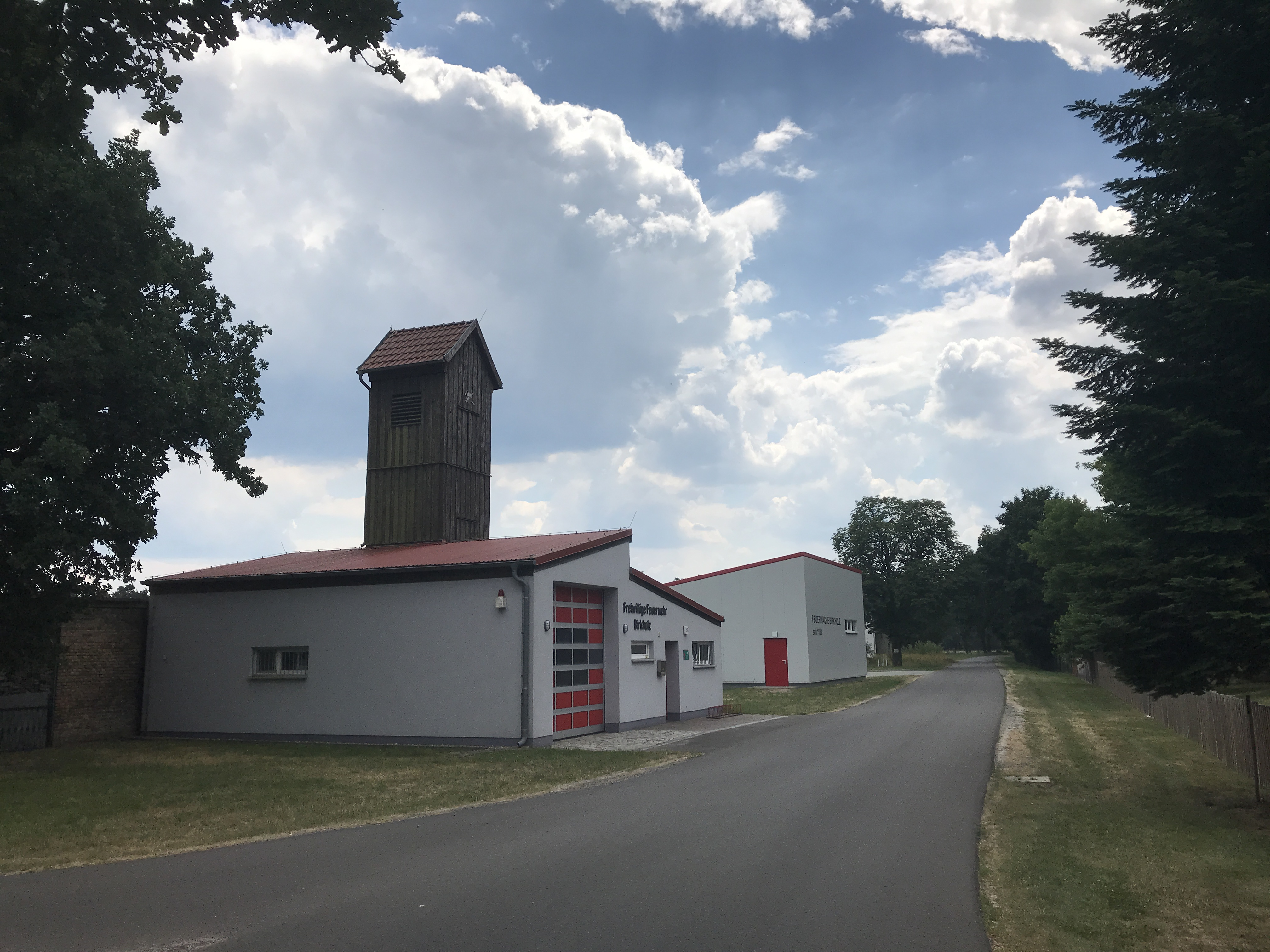 Birkholz, ein Ortsteil der Gemeinde Münchehofe im Land Brandenburg